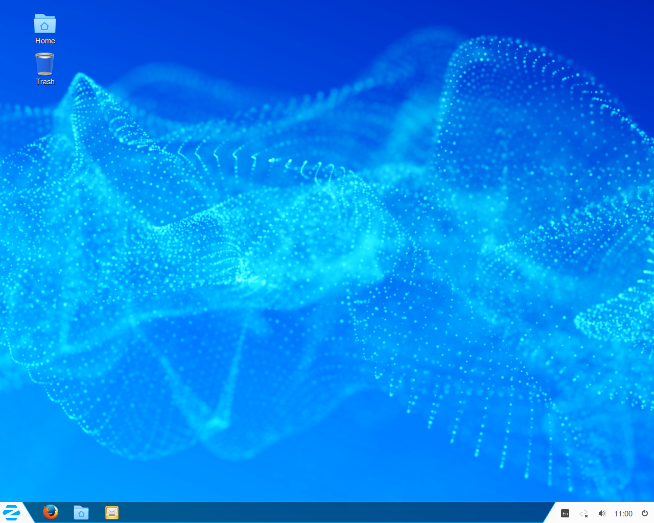 Zorin OS — дистрибутив Linux, основанный на Ubuntu